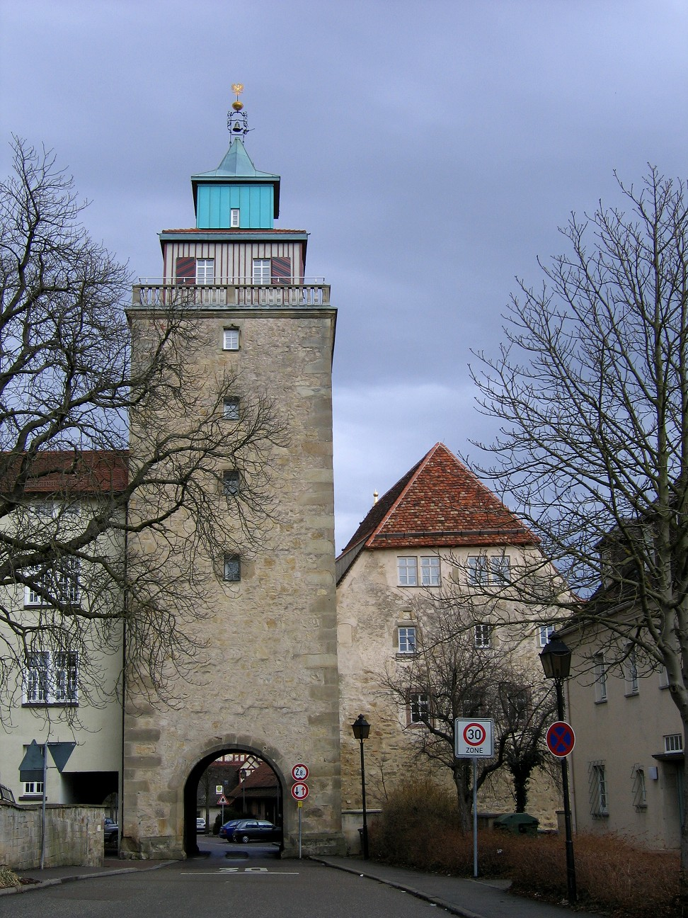 Das Stadttor (Oberes Tor) in Markgröningen